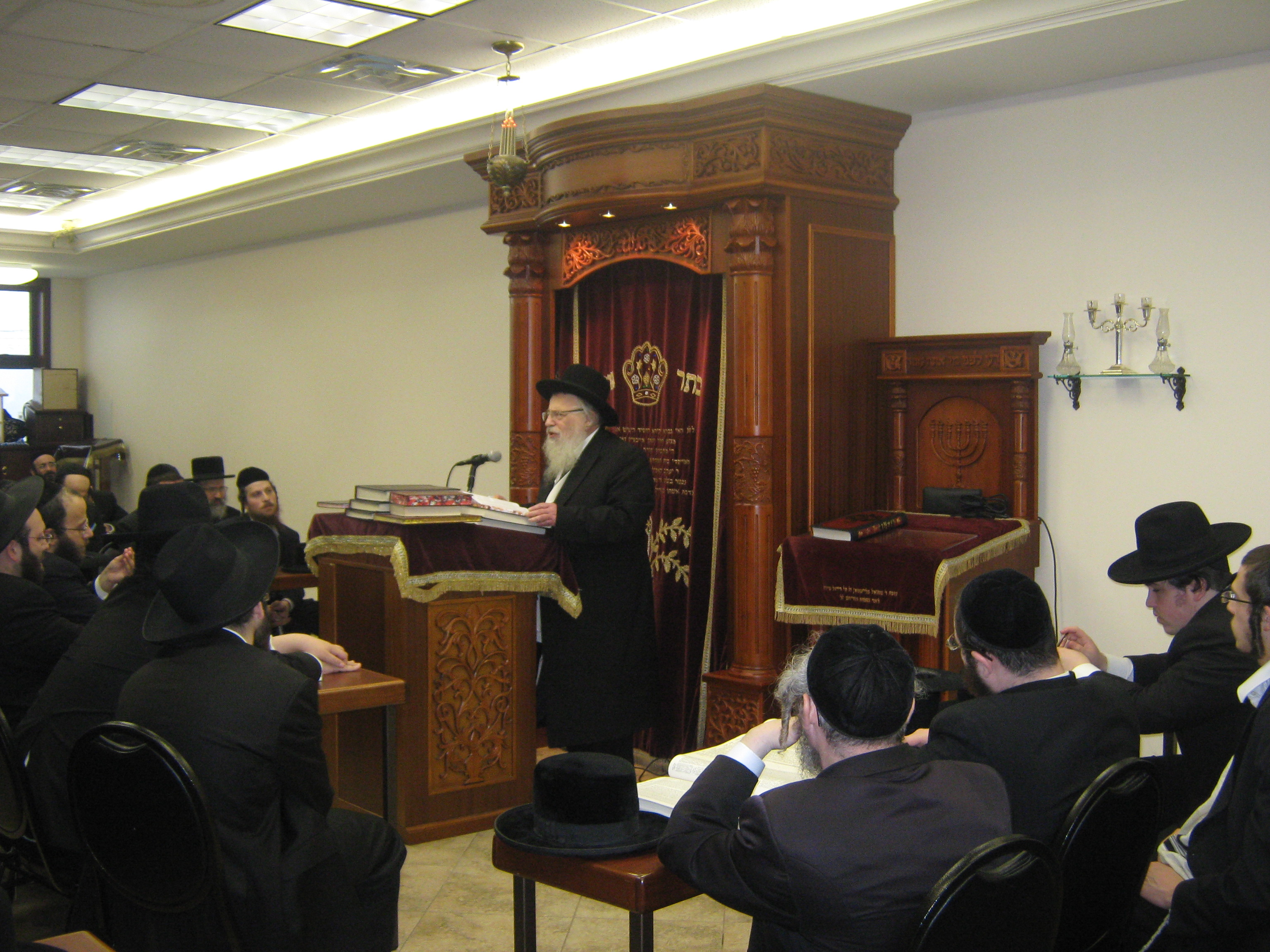 ראש ישיבת גיסטהד בבית המדרש של חסידות ראדמאסק בבורו פארק